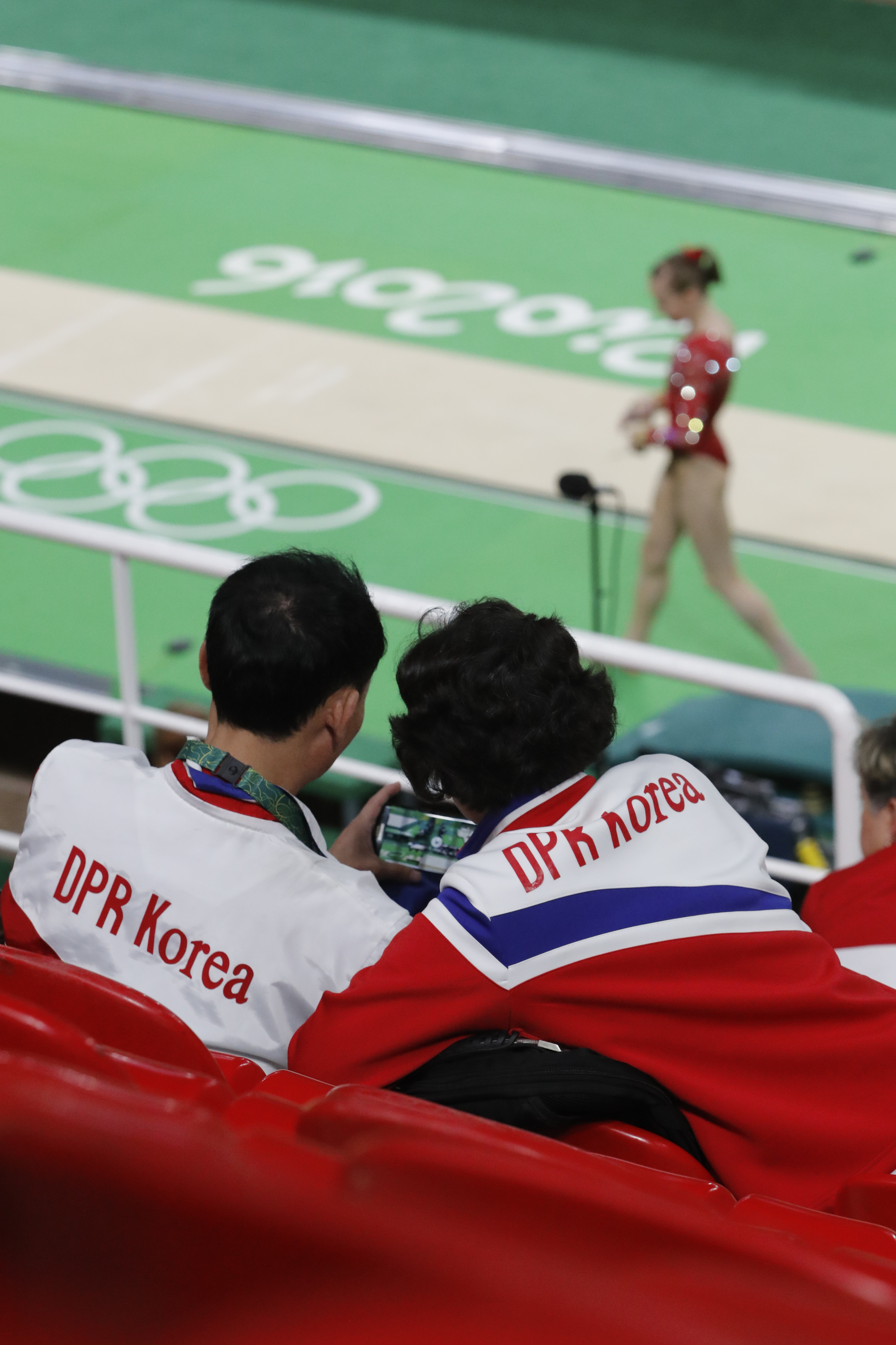 Rio de Janeiro - Representantes da Coréia do Norte filmam o treino de Simone Biles, estrela do time de ginástica artística dos Estados Unidos, na Arena Olímpica dos Jogos Rio 2016 (Fernando Frazão/Agência Brasil)